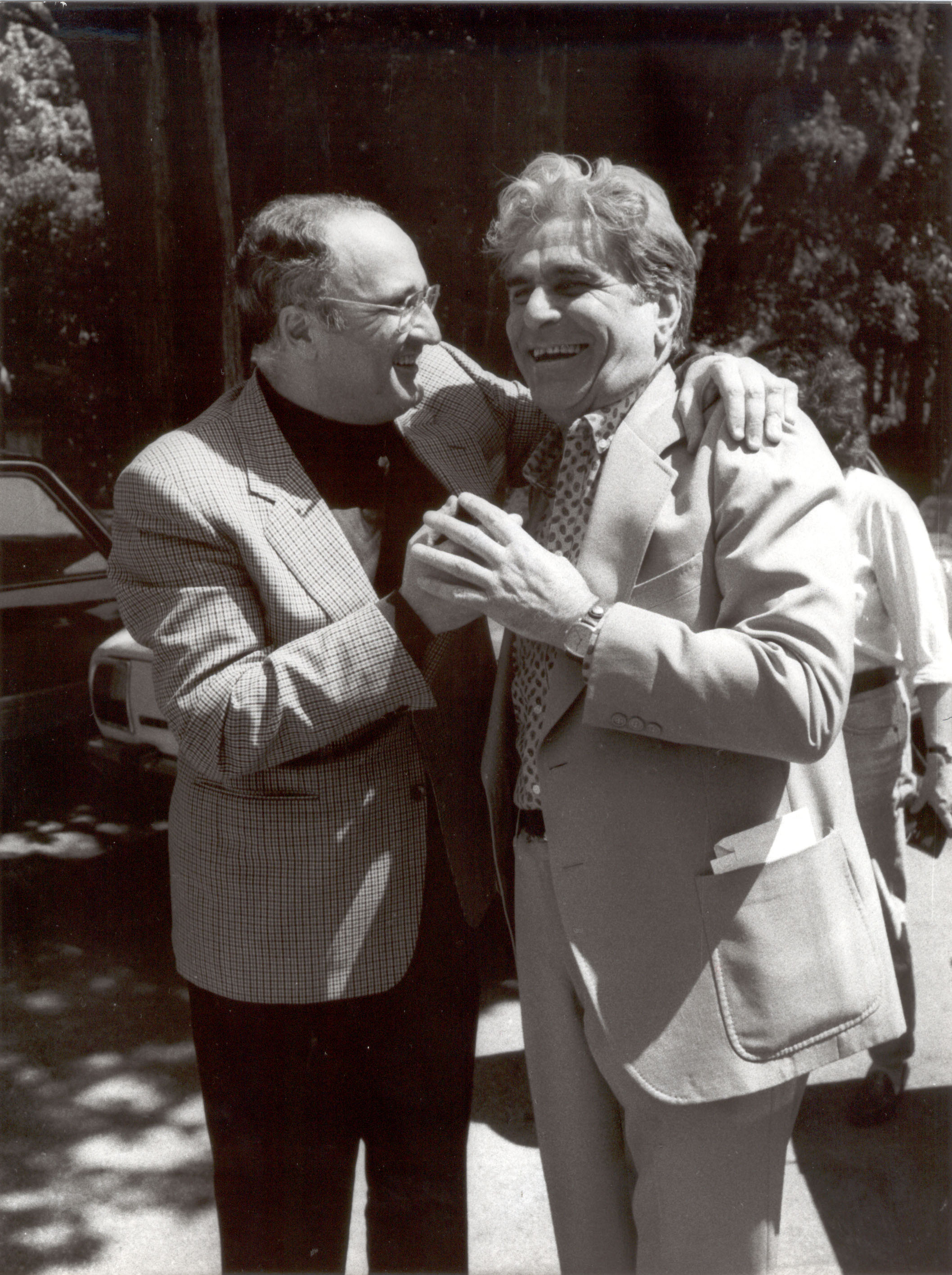 Piero Farulli e Salvatore Accardo